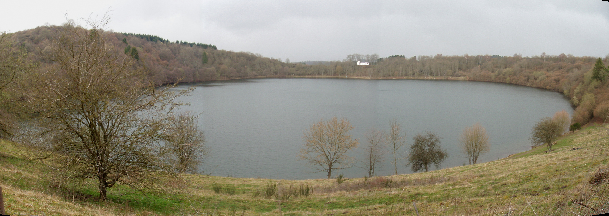 Beschreibung: Weinfelder Maar / Totenmaar Erstellungsdatum: April 2004 Fotograf: Peter Schüle Lizenz